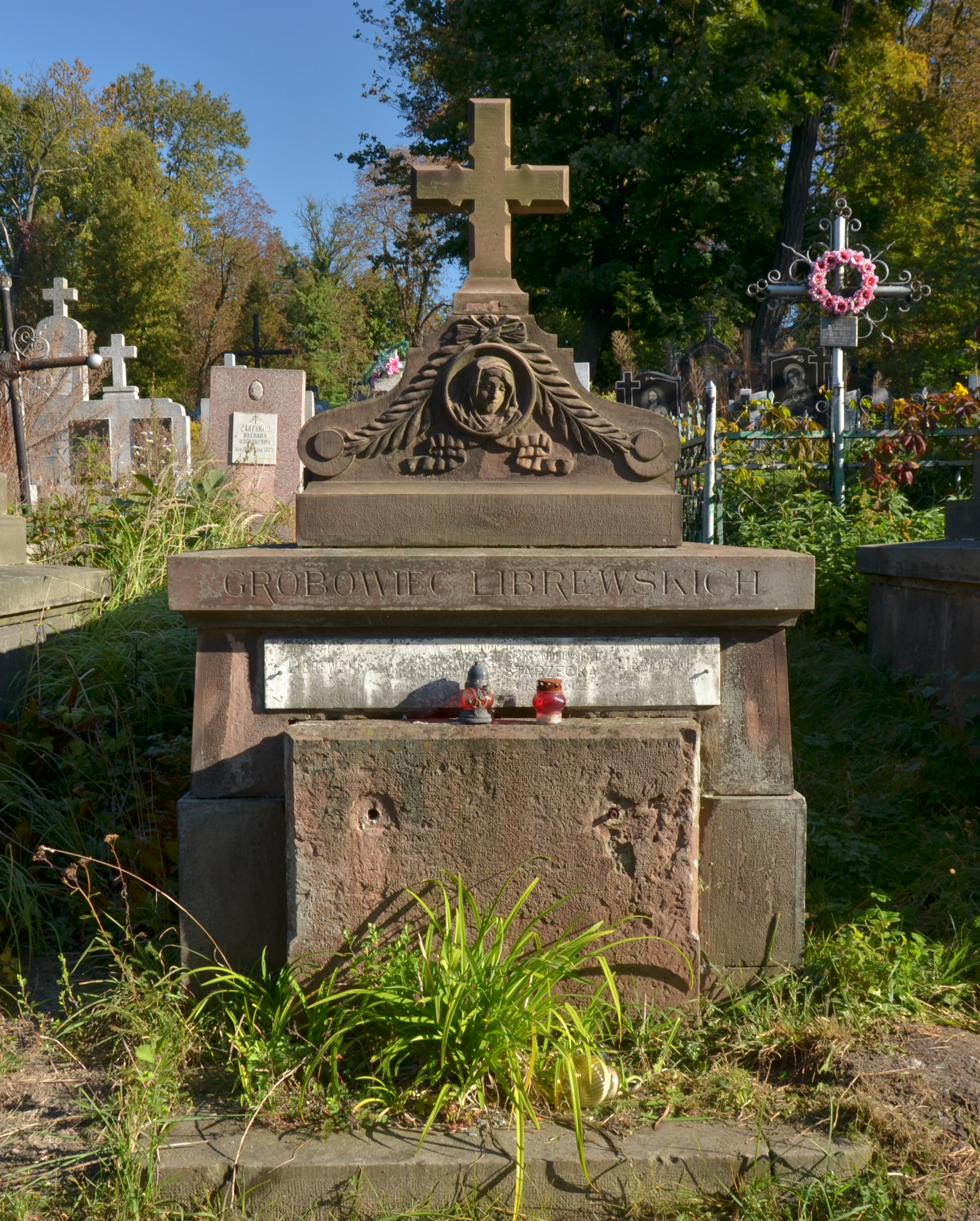 Гробівець Лібревських на Янівському цвинтарі у Львові.